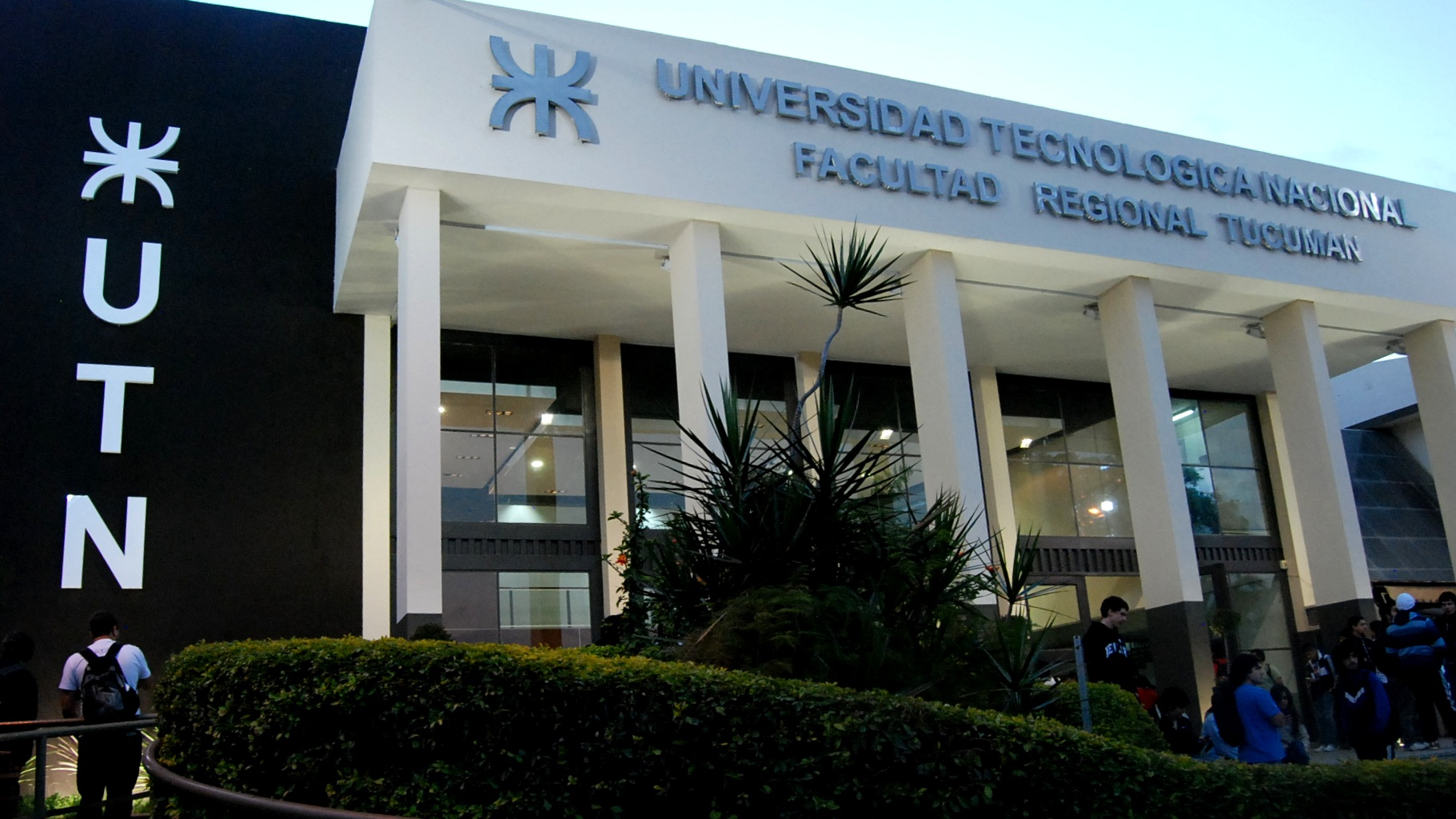 Fachada de la UTN - Facultad Regional Tucumán